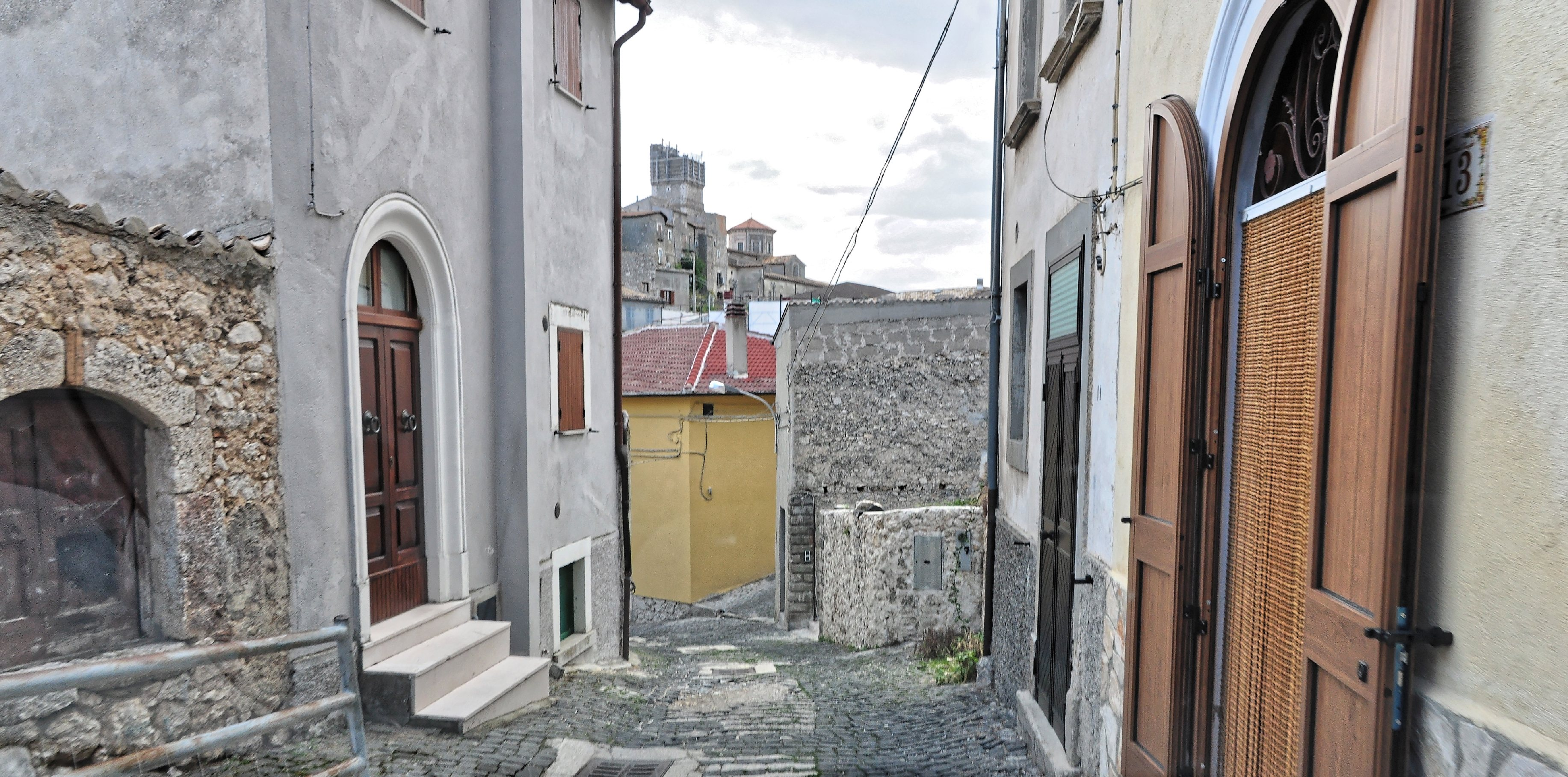 Castel del Monte 2013 Dieses Foto entstand in Zusammenarbeit mit Stadtbesichtigungen.de Die Seiten Stadtbesichtigungen.de, der dazugehörige Reise Blog sowie die Facebookseite: Stadtbesichtigungen Rom dürfen dieses Bild für Ihre Veröffentlichungen ohne den Hinweis auf Wikipedia, Commons bzw der Lizenz verwenden. Die Verantwortlichen habe von mir (Ra Boe) die Originaldaten zur freien Verfügung übermittelt bekommen.